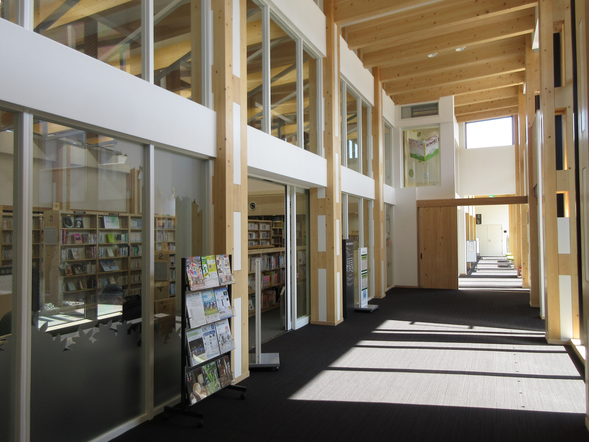 岡崎市立額田図書館。岡崎市額田センター（岡崎市樫山町）の中にある。